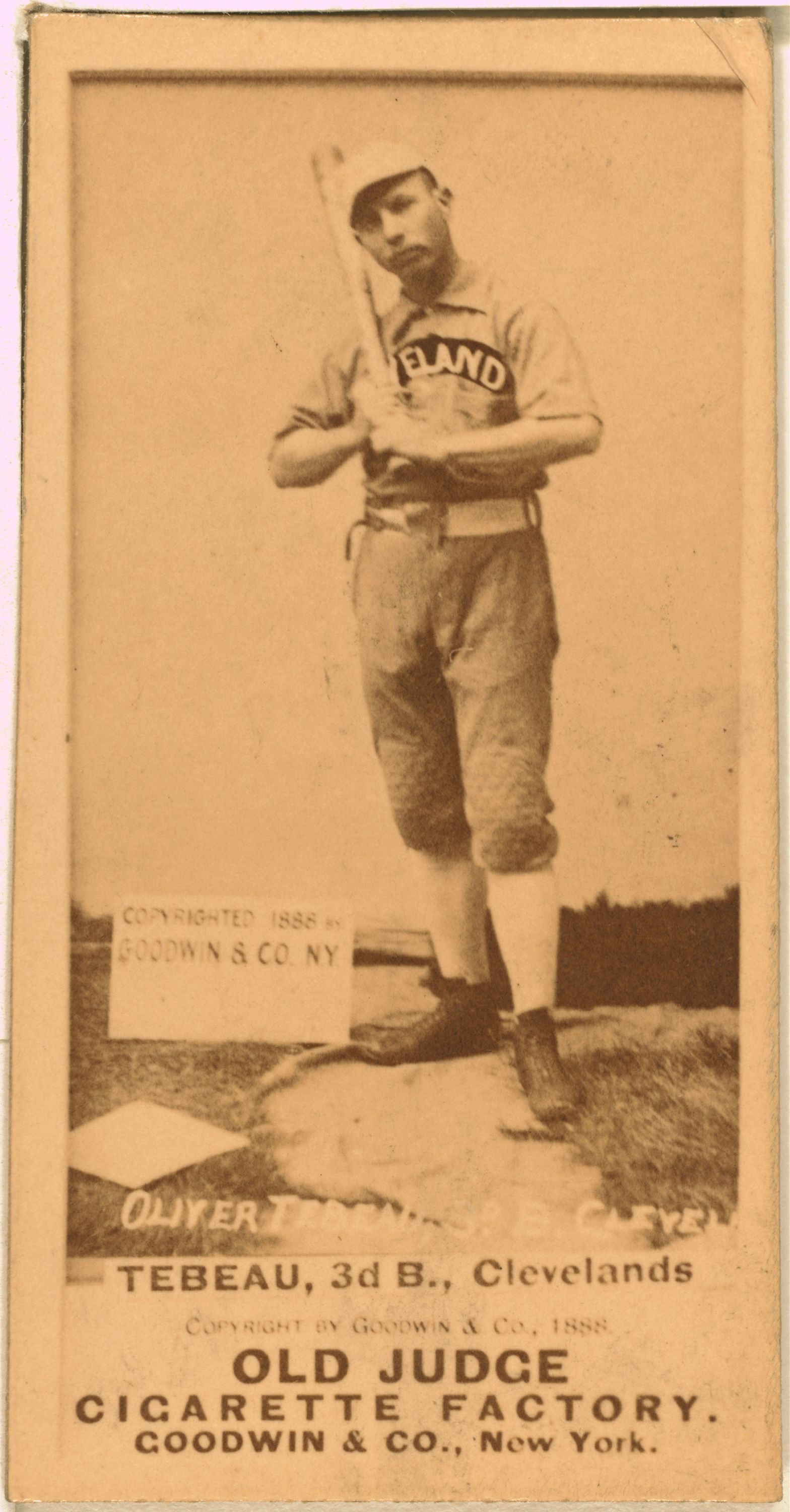 Patsy Tebeau